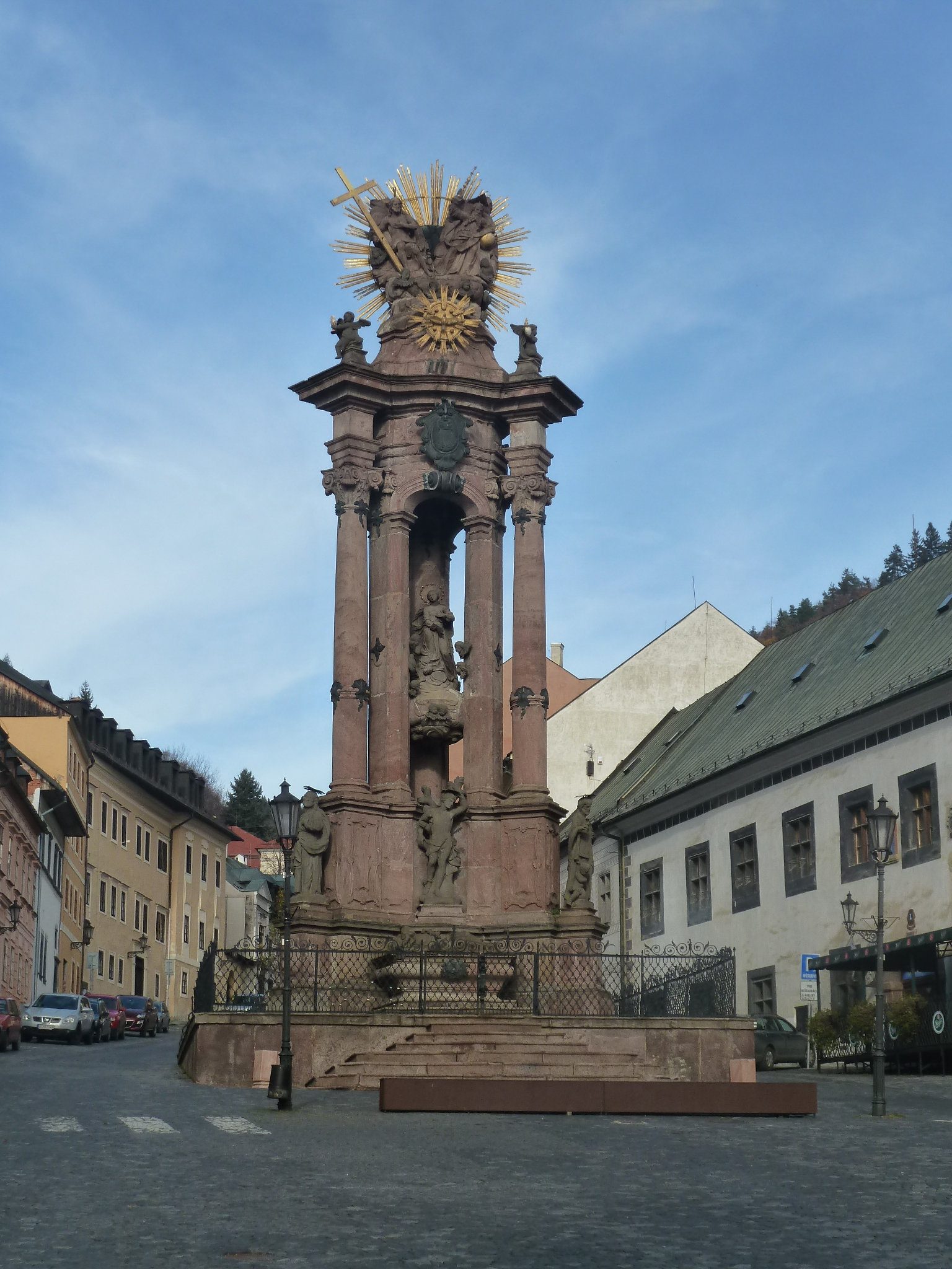 Stĺp Panny Márie a Najsvätejšej Trojice v Banskej Štiavnici. Object location48° 27′ 35.02″ N, 18° 53′ 31.71″ E